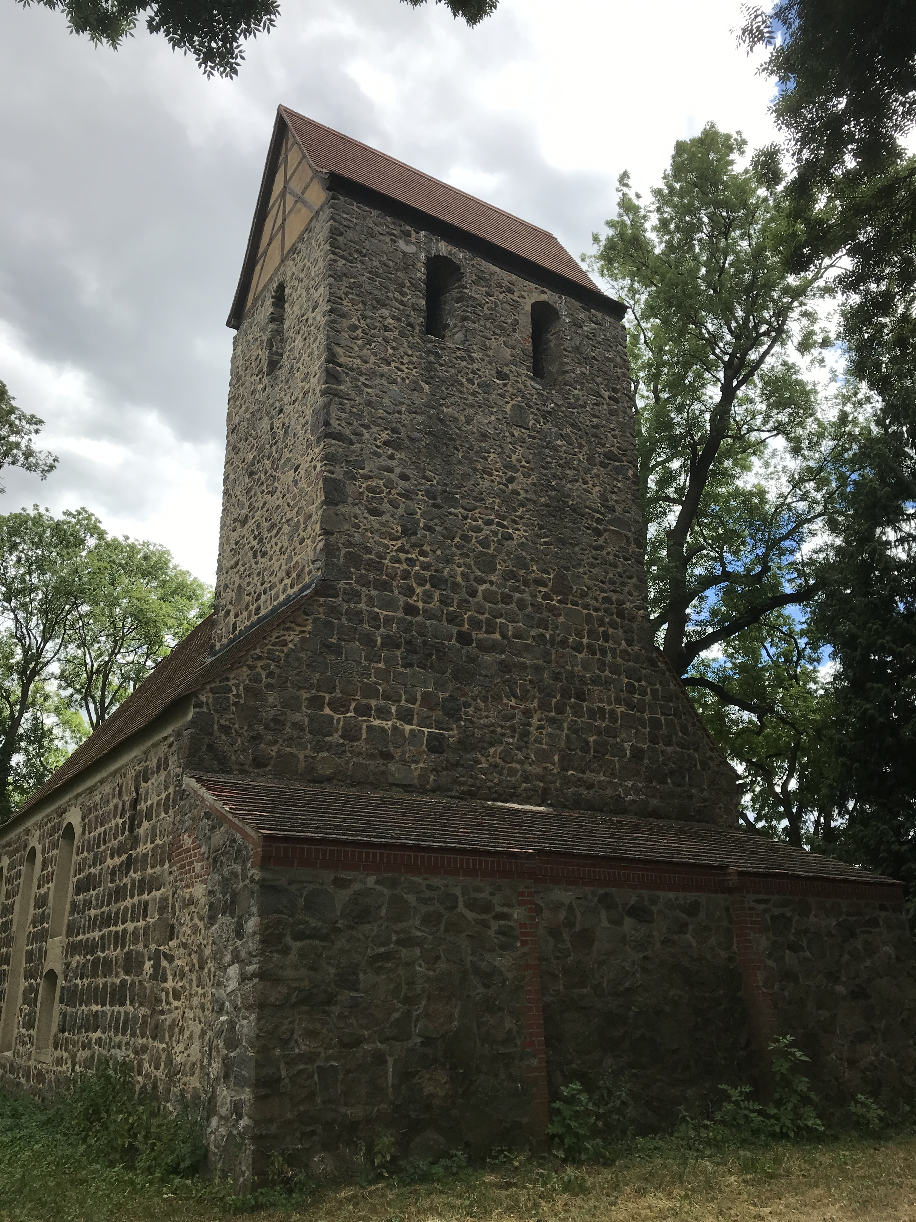 Die Dorfkirche Groß Ziescht ist eine Feldsteinkirche aus der ersten Hälfte des 13. Jahrhunderts in Baruth/Mark im Land Brandenburg.